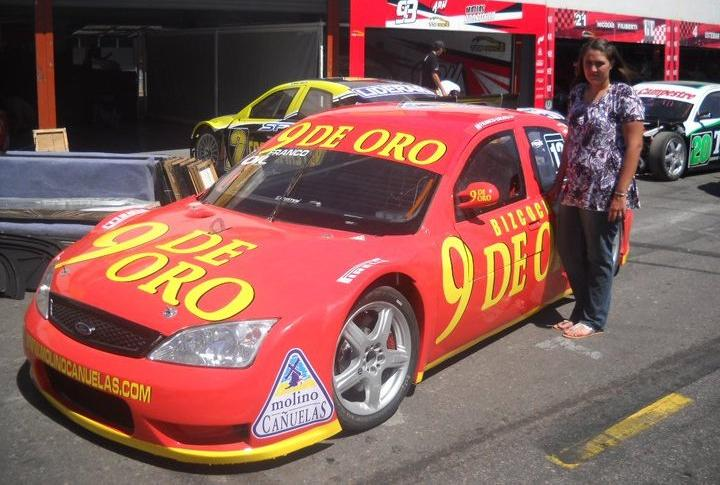 Ford Mondeo II de Top Race Series. Piloto: Franco Ércoli